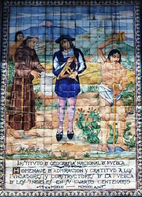 Escena que representa la Fundación de Puebla, talavera poblana a un costado de la Iglesia de la Santisima Trinidad, Puebla